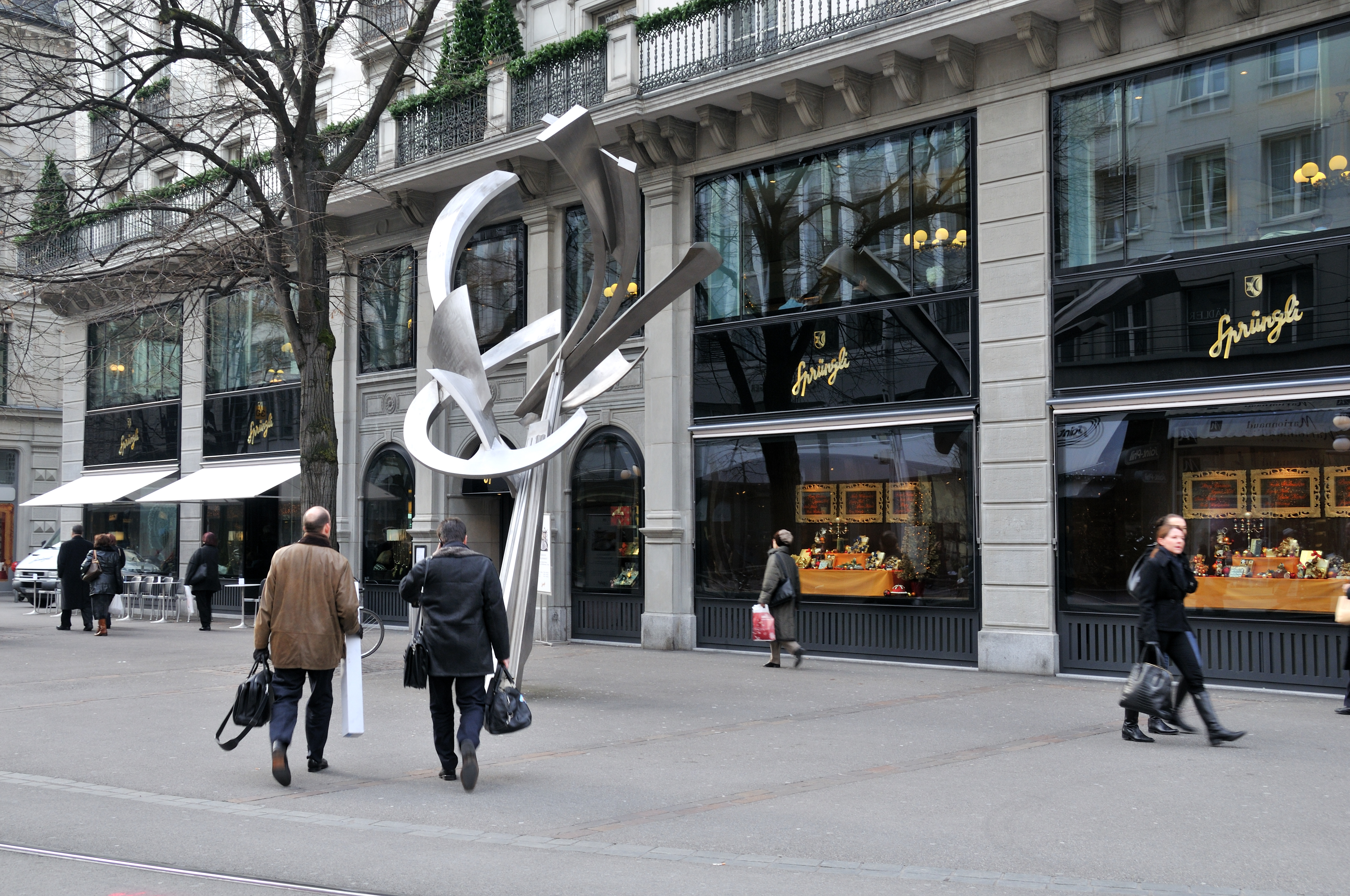 Confiserie Sprüngli on Bahnhofstrasse, Zürich.